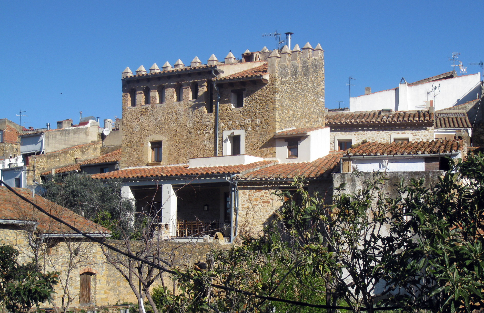 Torre de la Fonteta, vista des dels horts del darrere (Albocàsser)